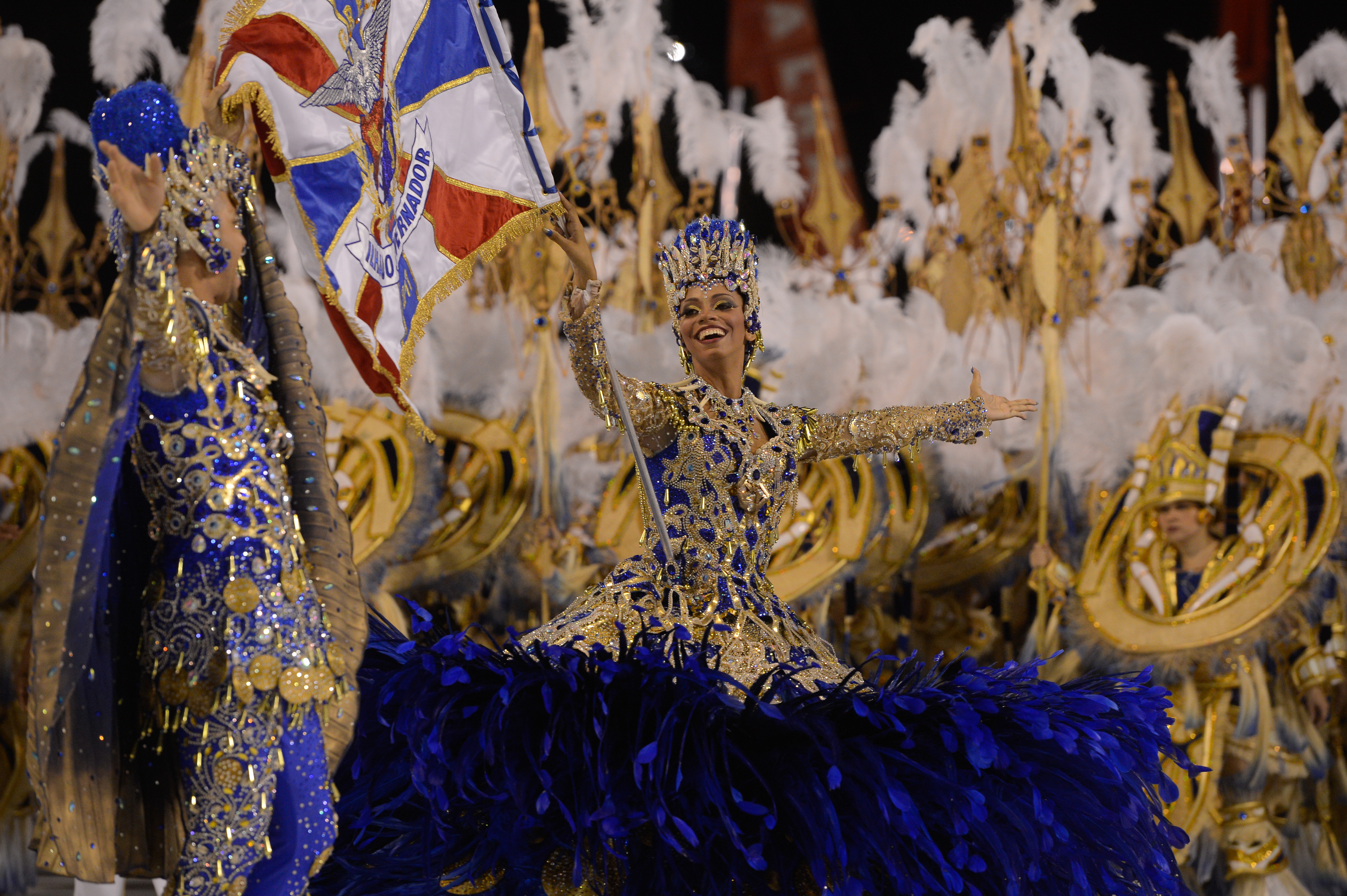 Rio de Janeiro - Desfile da escola de samba União da Ilha do Governador, pelo grupo especial, no Sambódromo (Fernando Frazão/Agência Brasil)